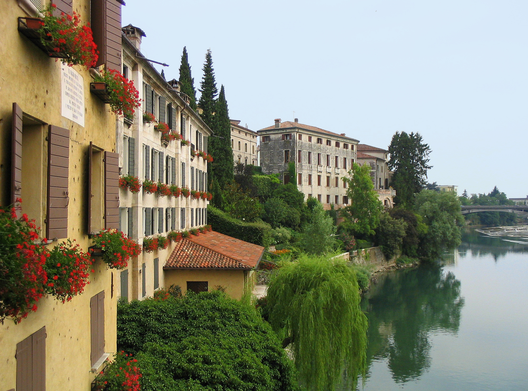 River in Bassano del Grappa, Province of Vicenza, Italy